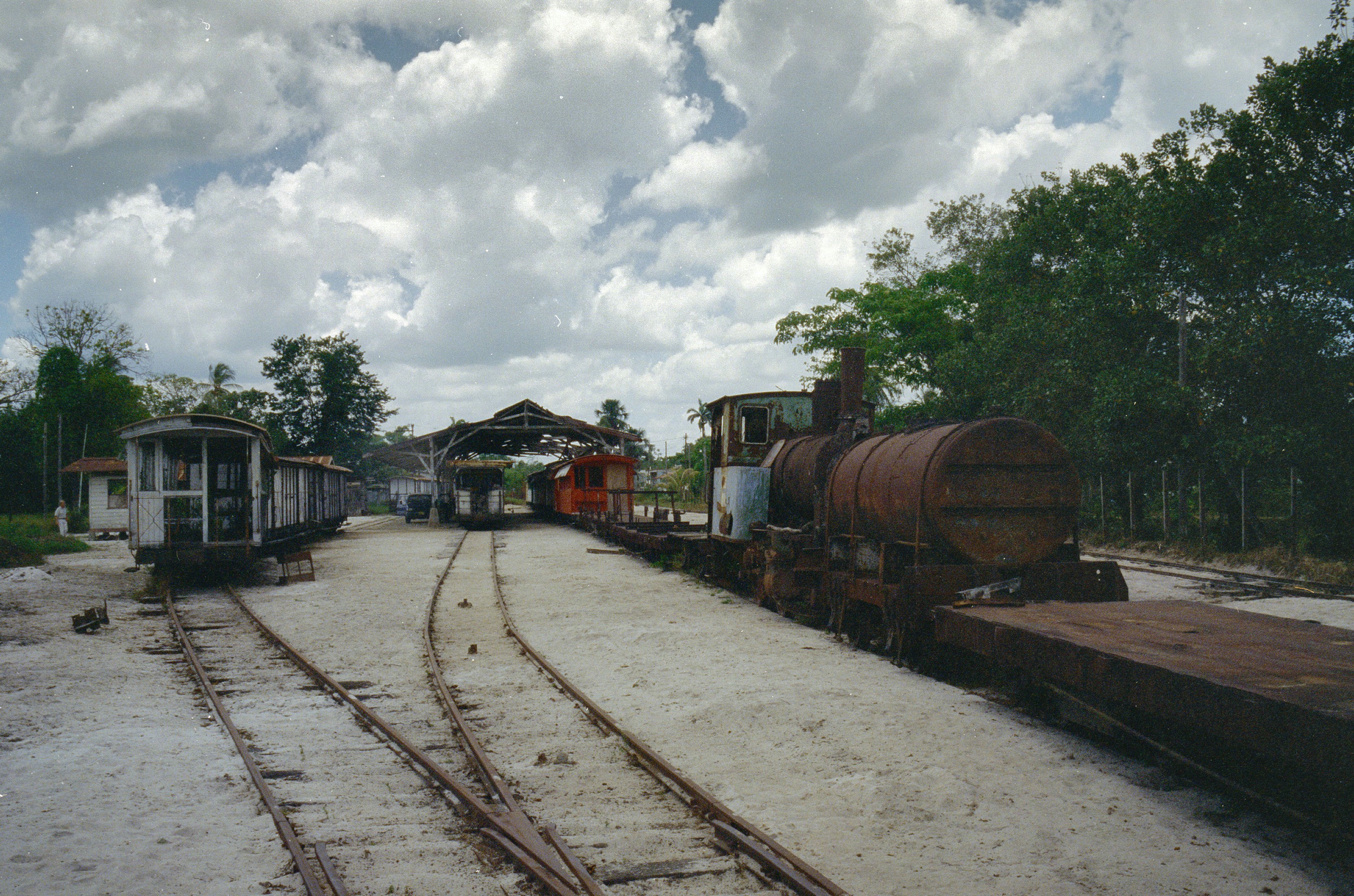 Voormalig station: Overzicht voormalig station (opmerking: Suriname Reis Loek Tangel)